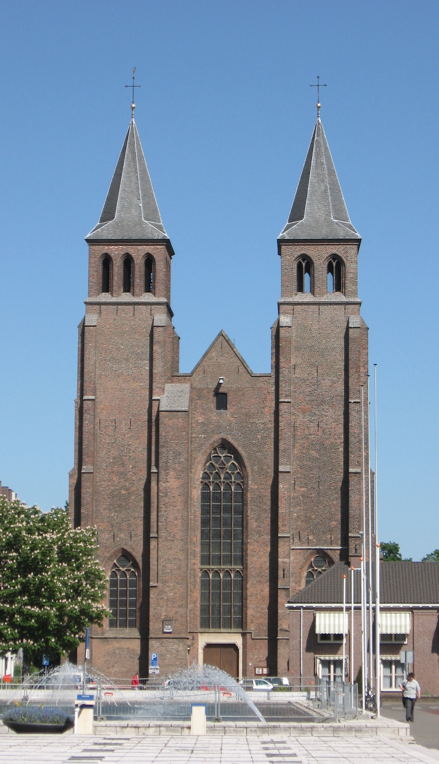 St. Walburgius-basiliek, Arnhem